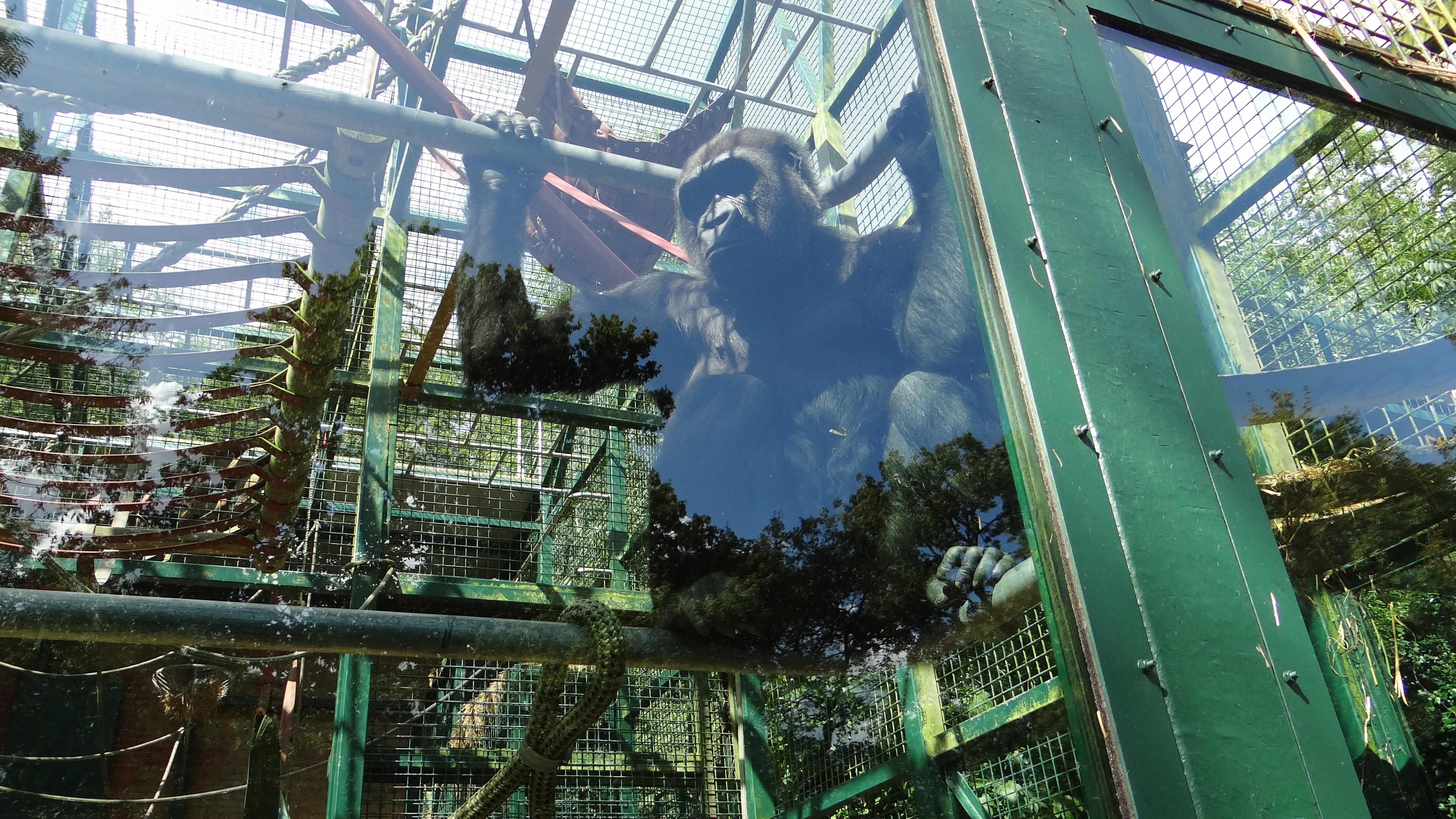 Zoo de Port Lympne